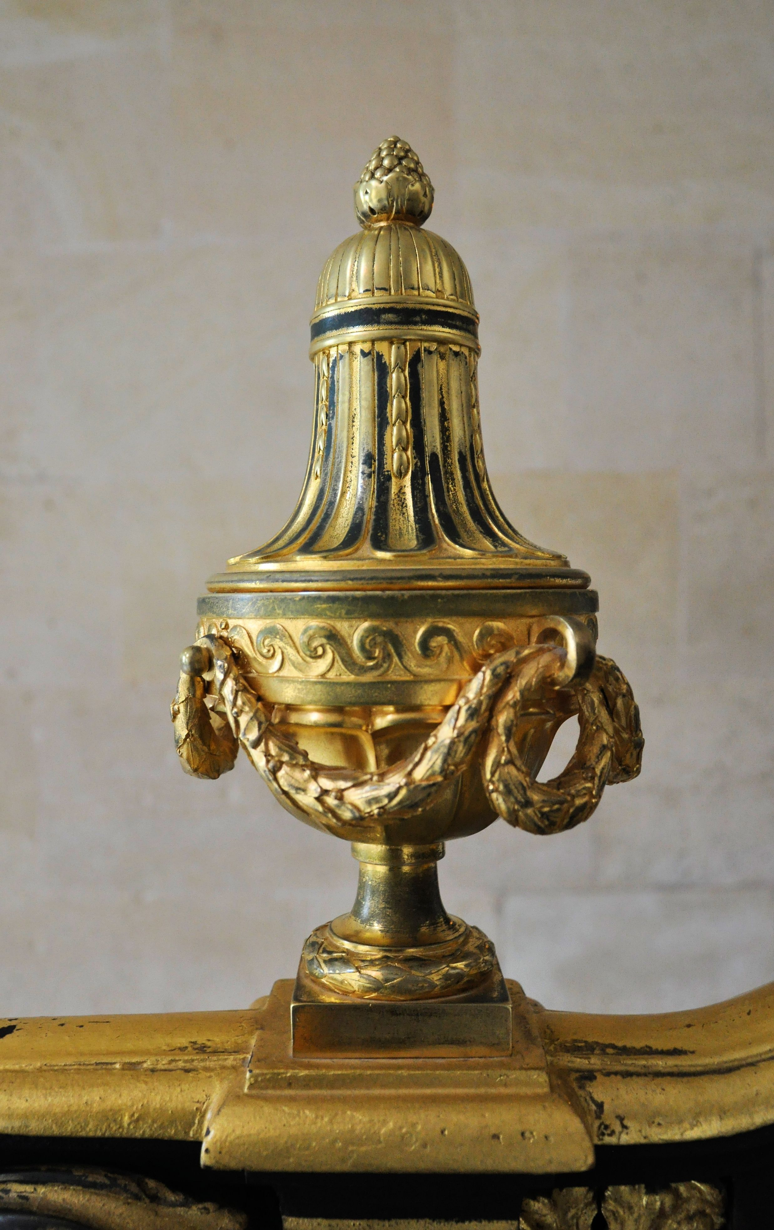 Petit Trianon - Escalier central - détail